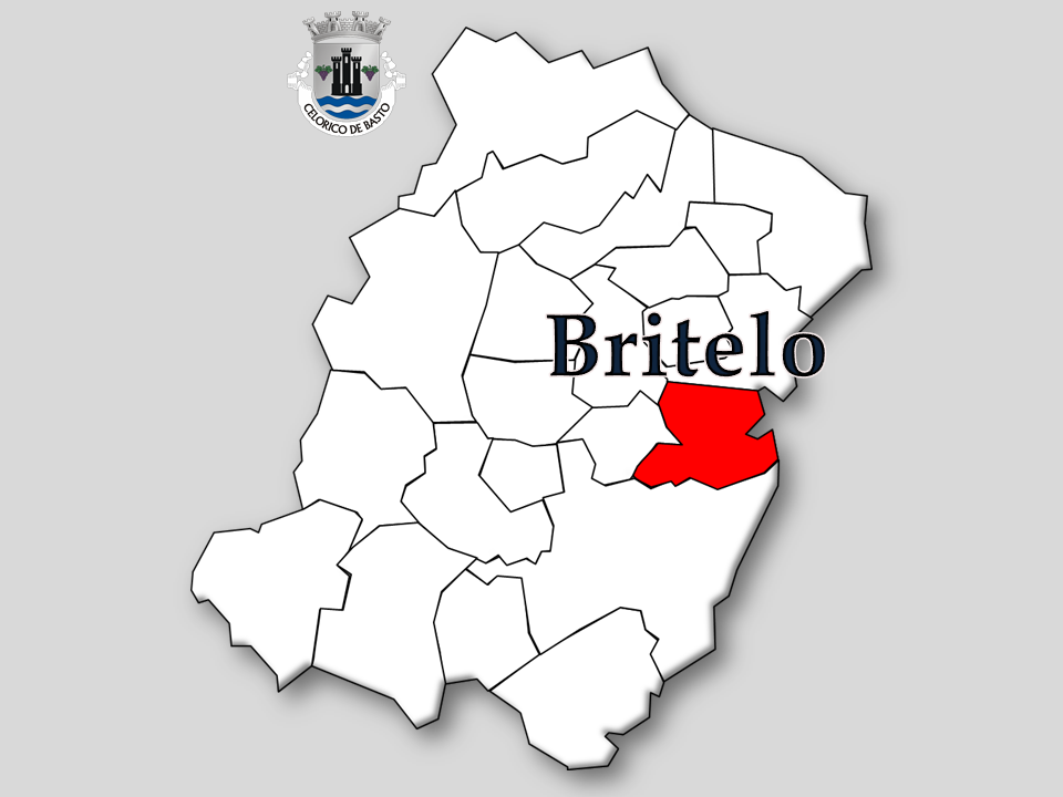 Censos 1864/2011